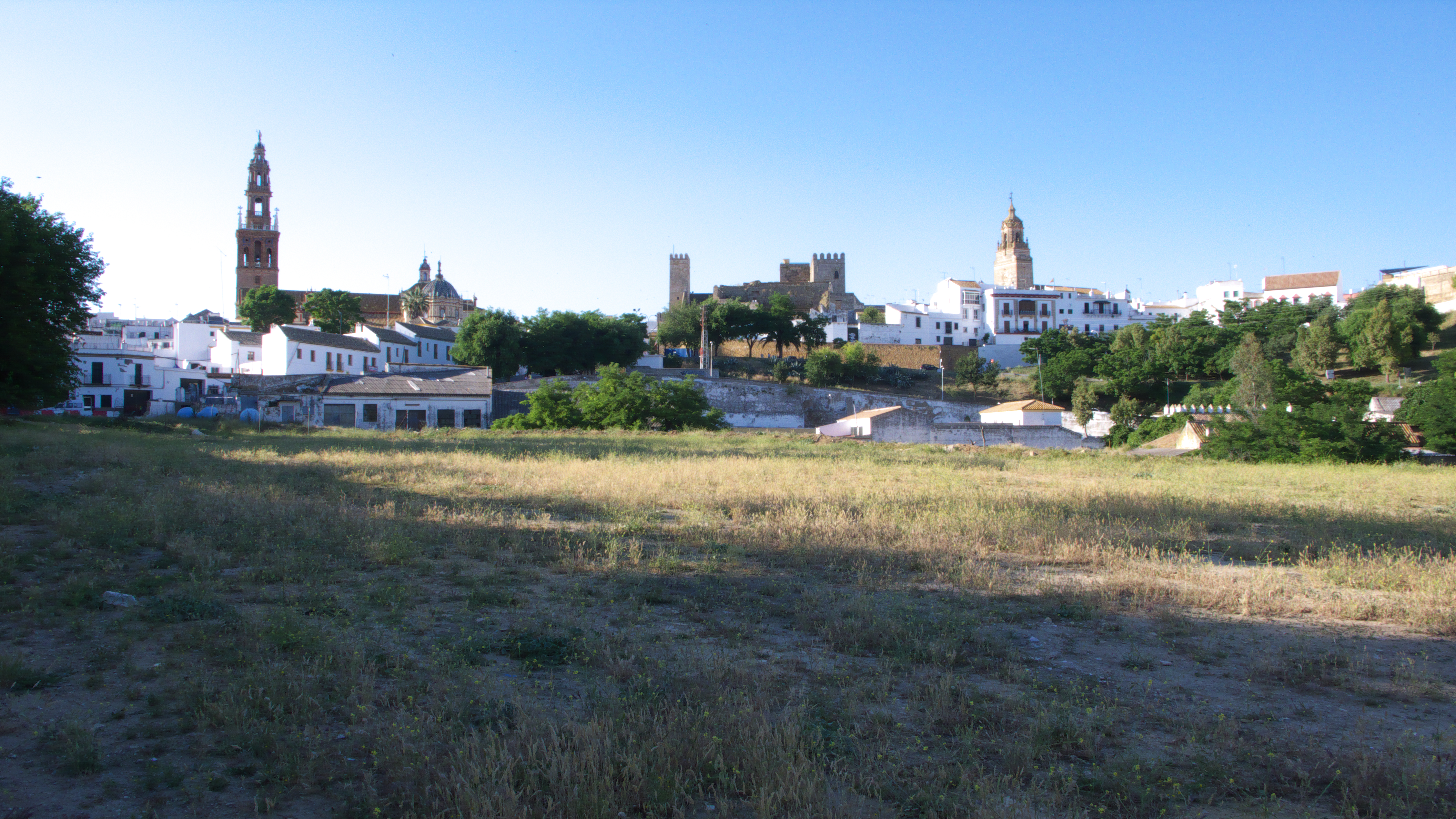 Vista panorámica